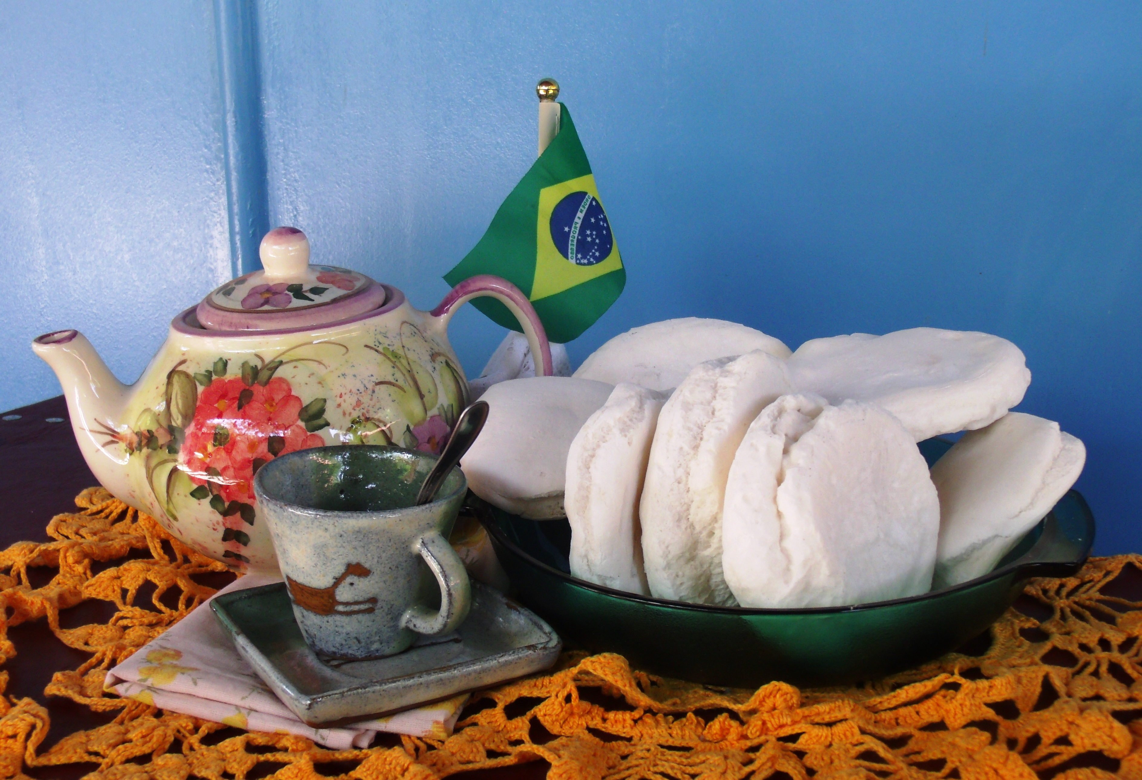 Broa, um pão da culinária cultural do Nordeste do Brasil.